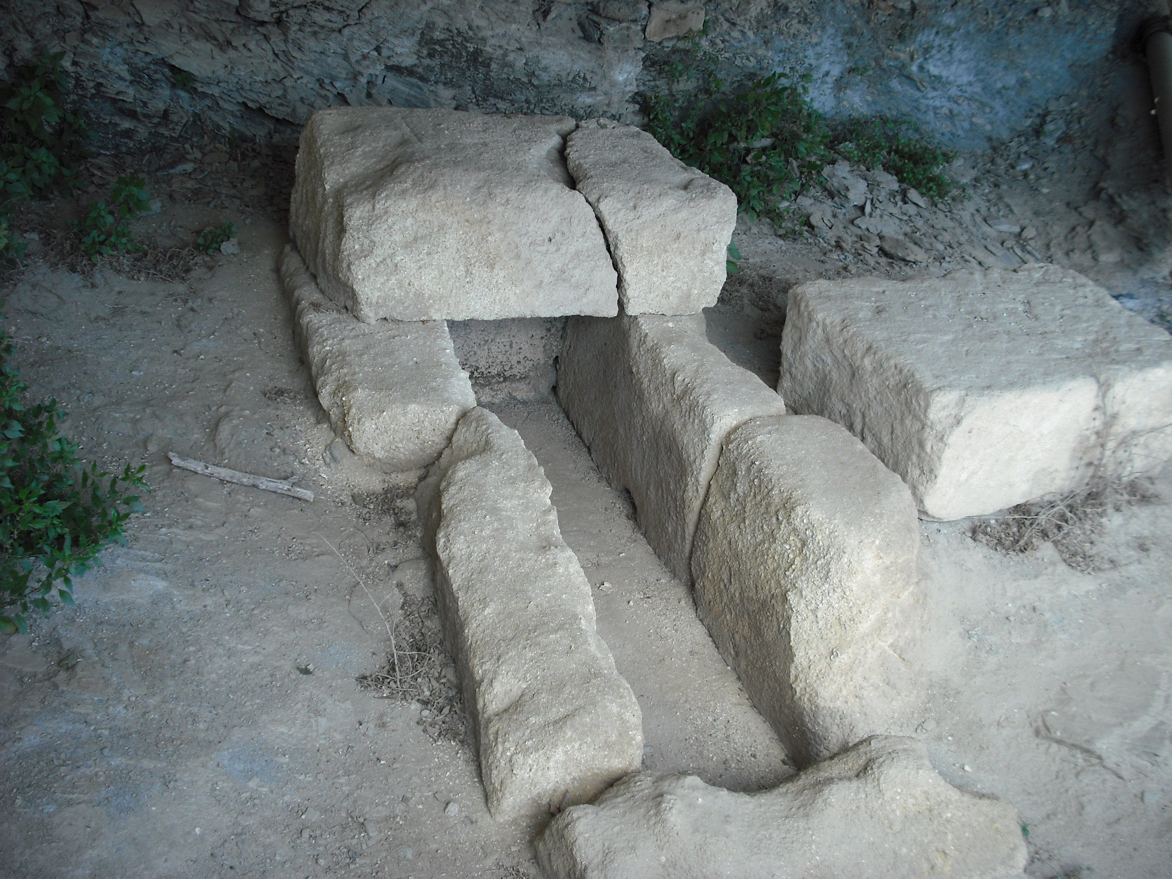 Toscanos, Cerro del Peñón, Cerro Alarcón, Cerro del Mar y Necrópolis de Jardín